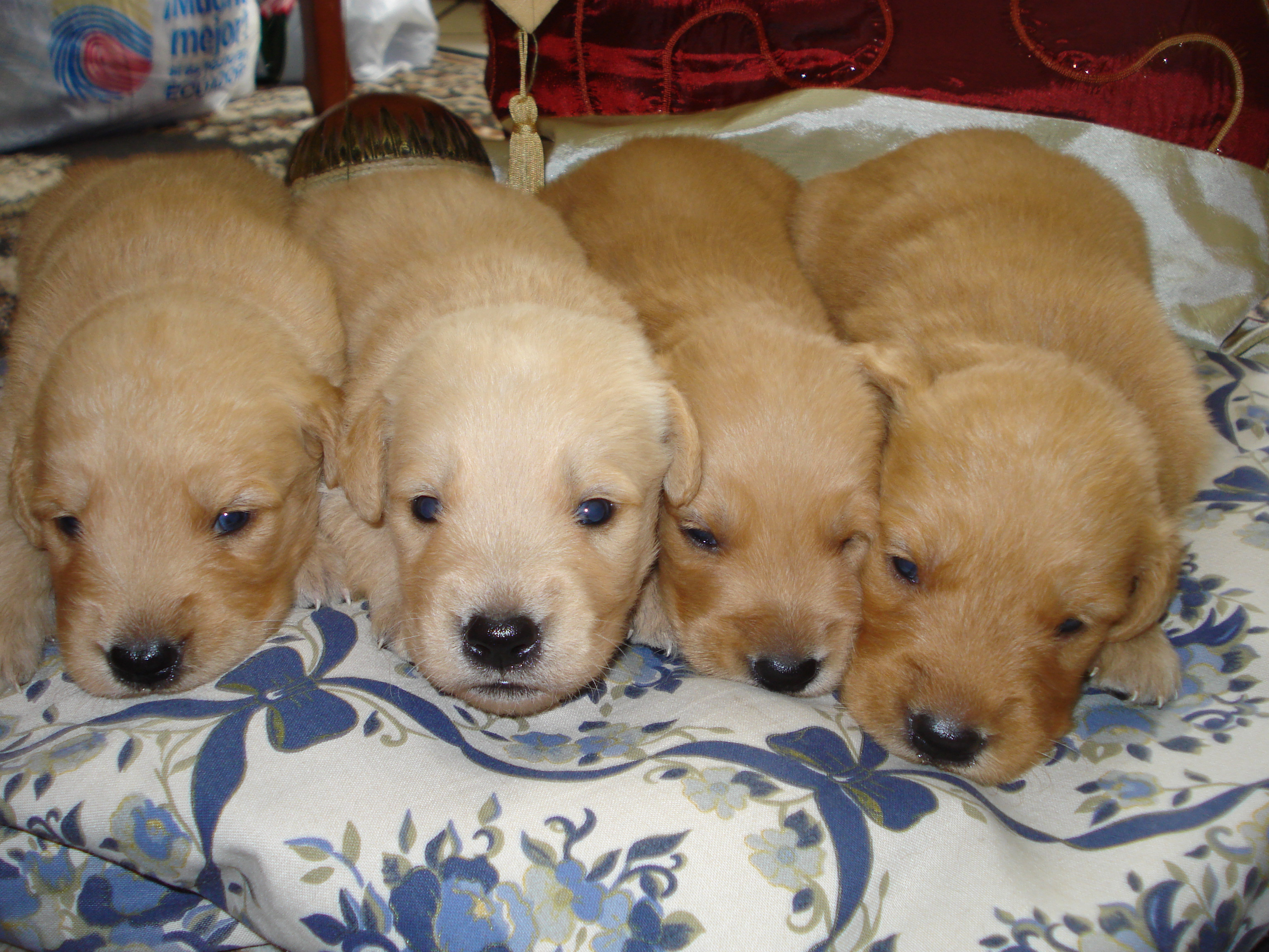 4 3 weeks old golden retriever.